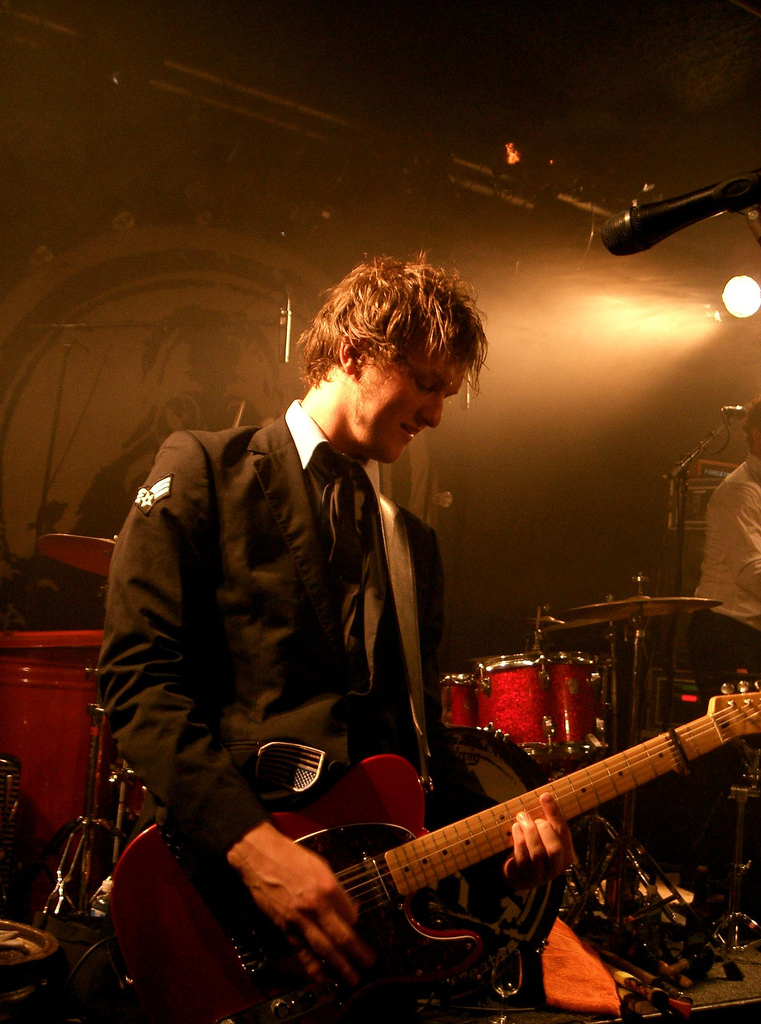 Geir Zahl, aka Gary "Hellraizer" Kaizer.